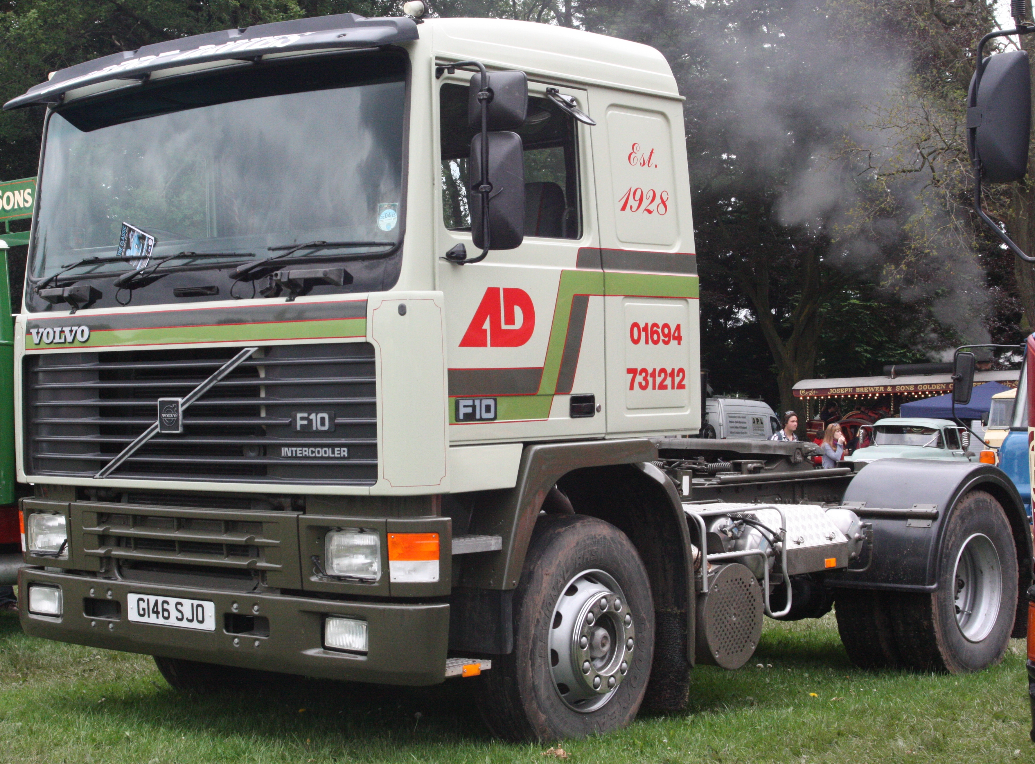 Abergavenny Steam, Veteran & Vintage Rally 2014